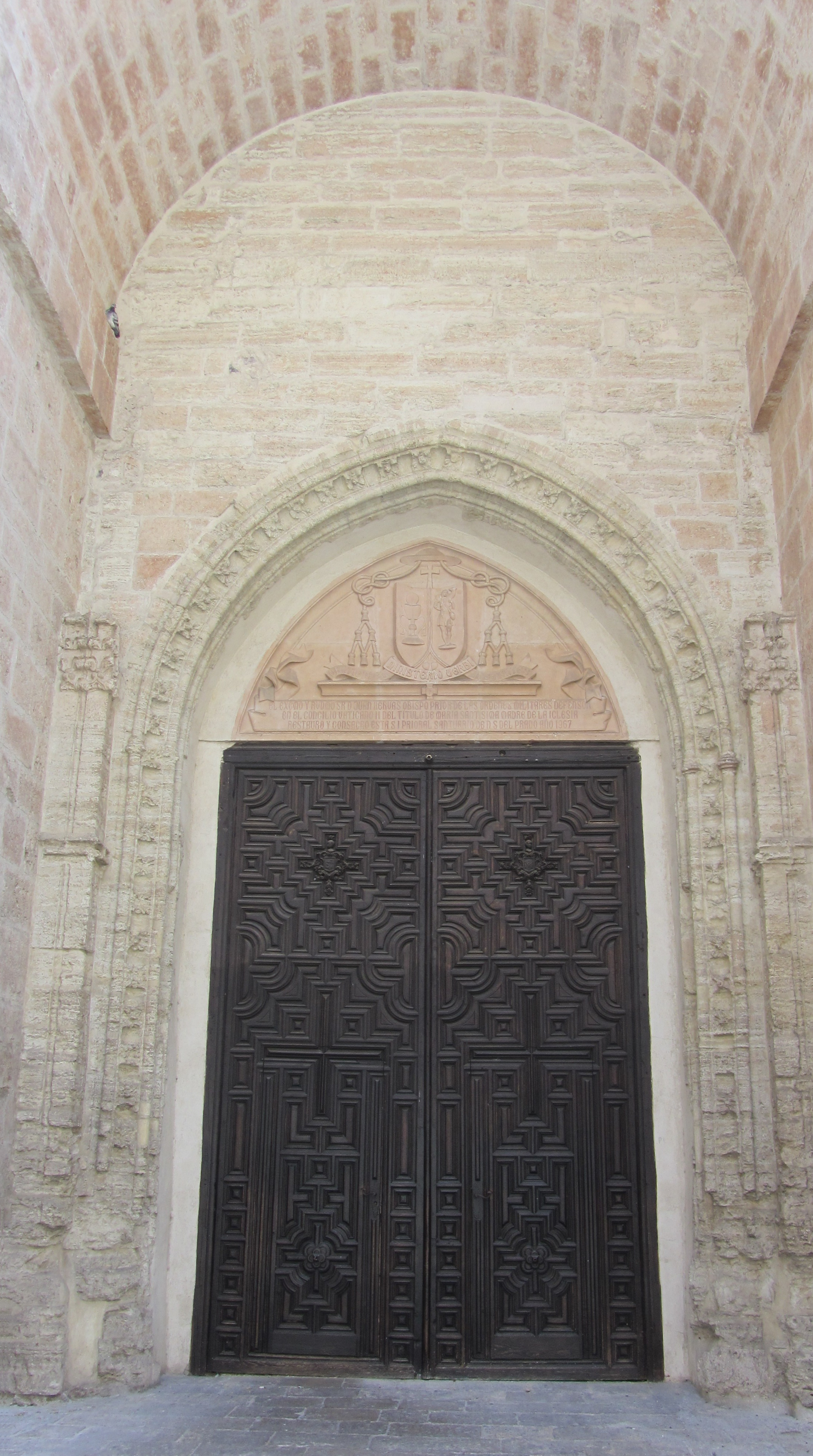 Puerta de la Umbría de la Catedral de Santa María del Prado de Ciudad Real (España), del siglo XV.